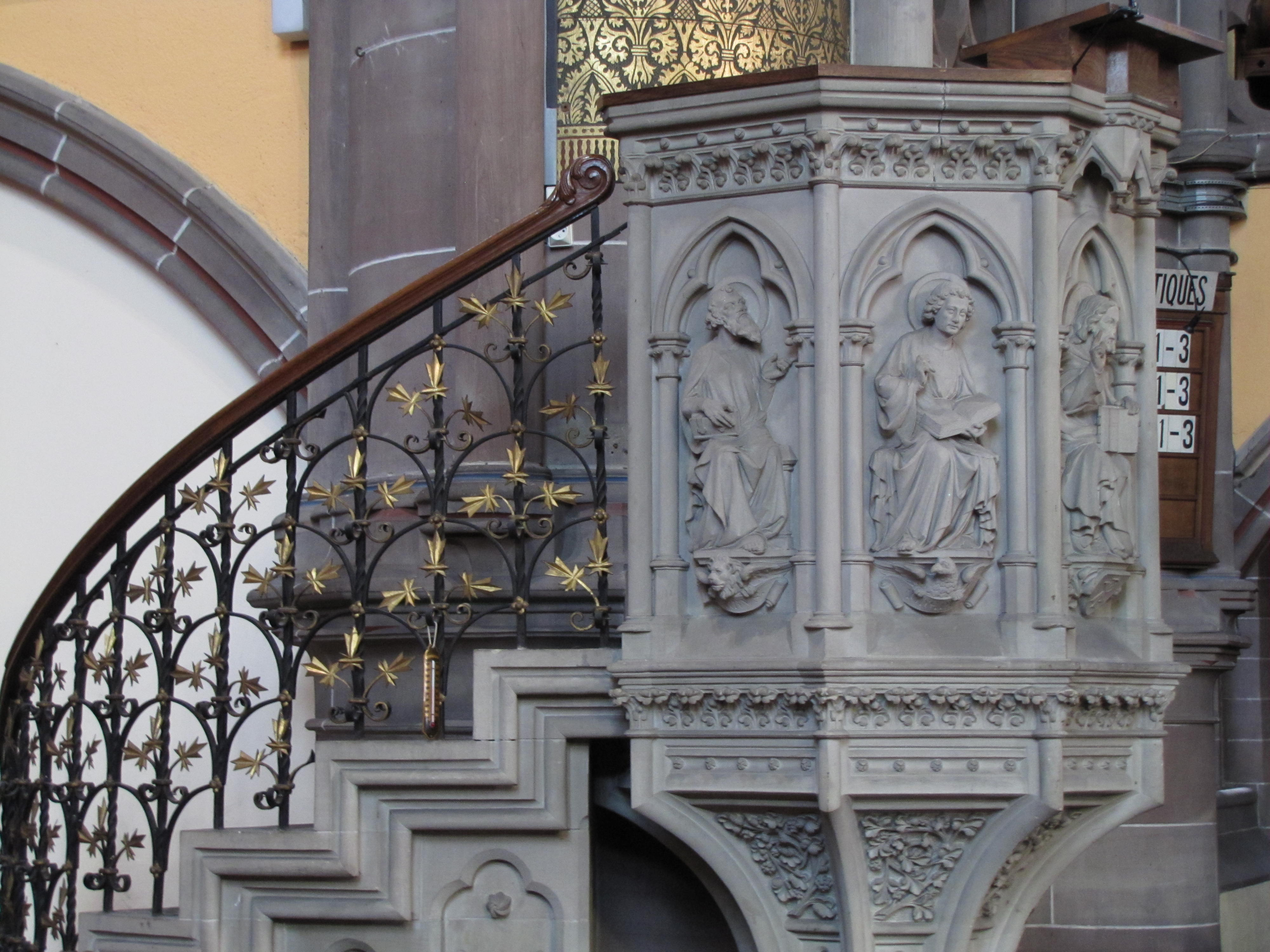 Alsace, Bas-Rhin, Église réformée Saint-Paul (1892) de Strasbourg (PA00085029), place du Général-Eisenhower: Chaire néo-gothique.